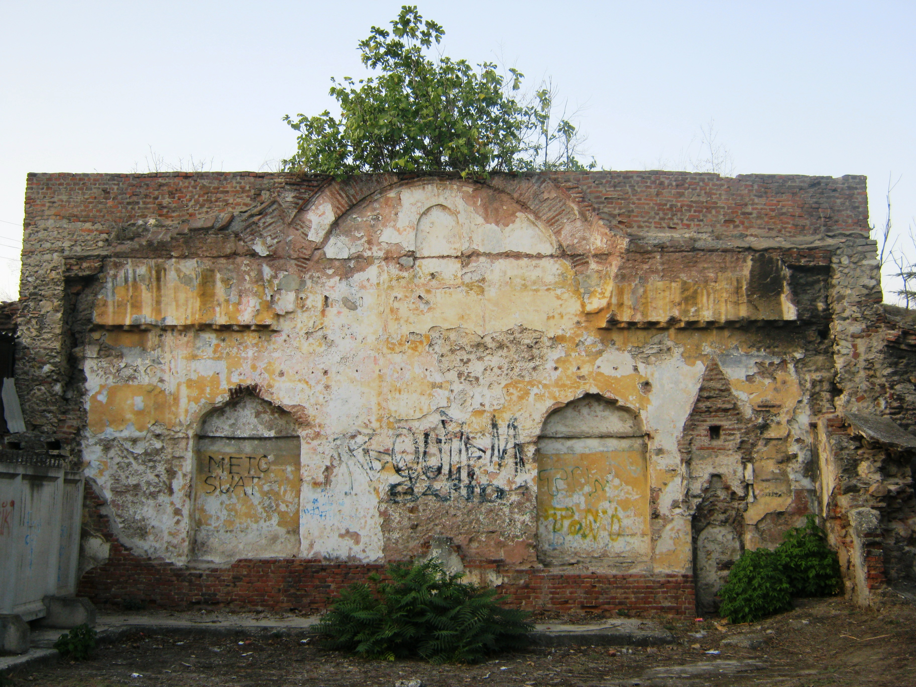 Остатоци од амамот „Стара нова бања“ во Скопје